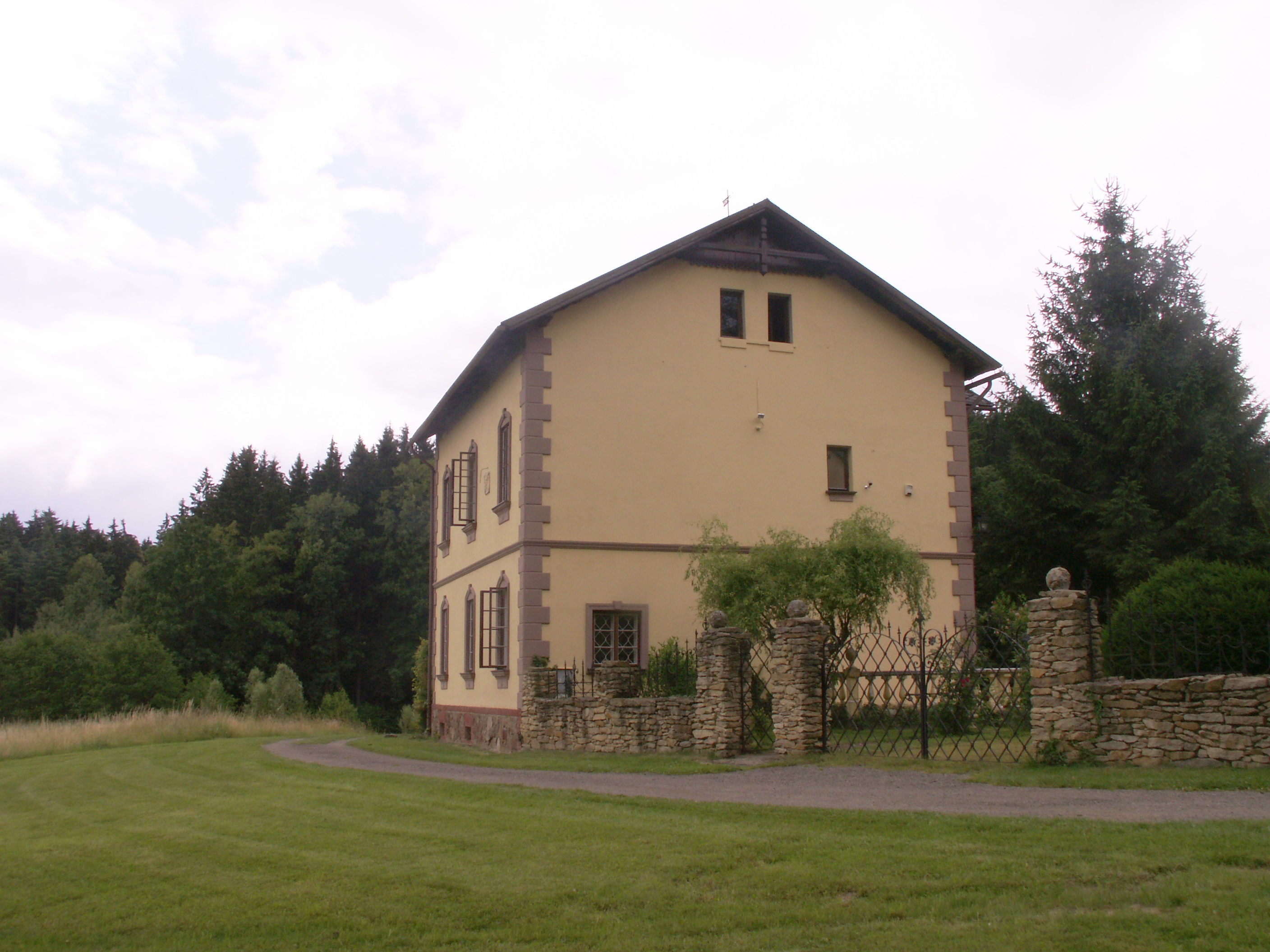 Dobrá Voda (část obce Malčín), okres Havlíčkův Brod